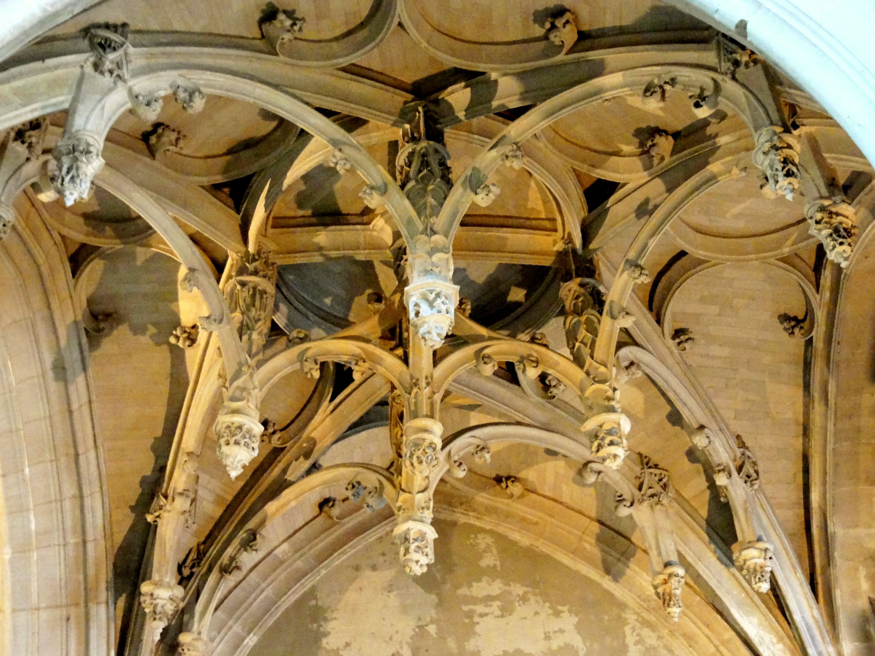 Chapelle Saint-Denis à l'est du croisillon sud, voûte flamboyante.